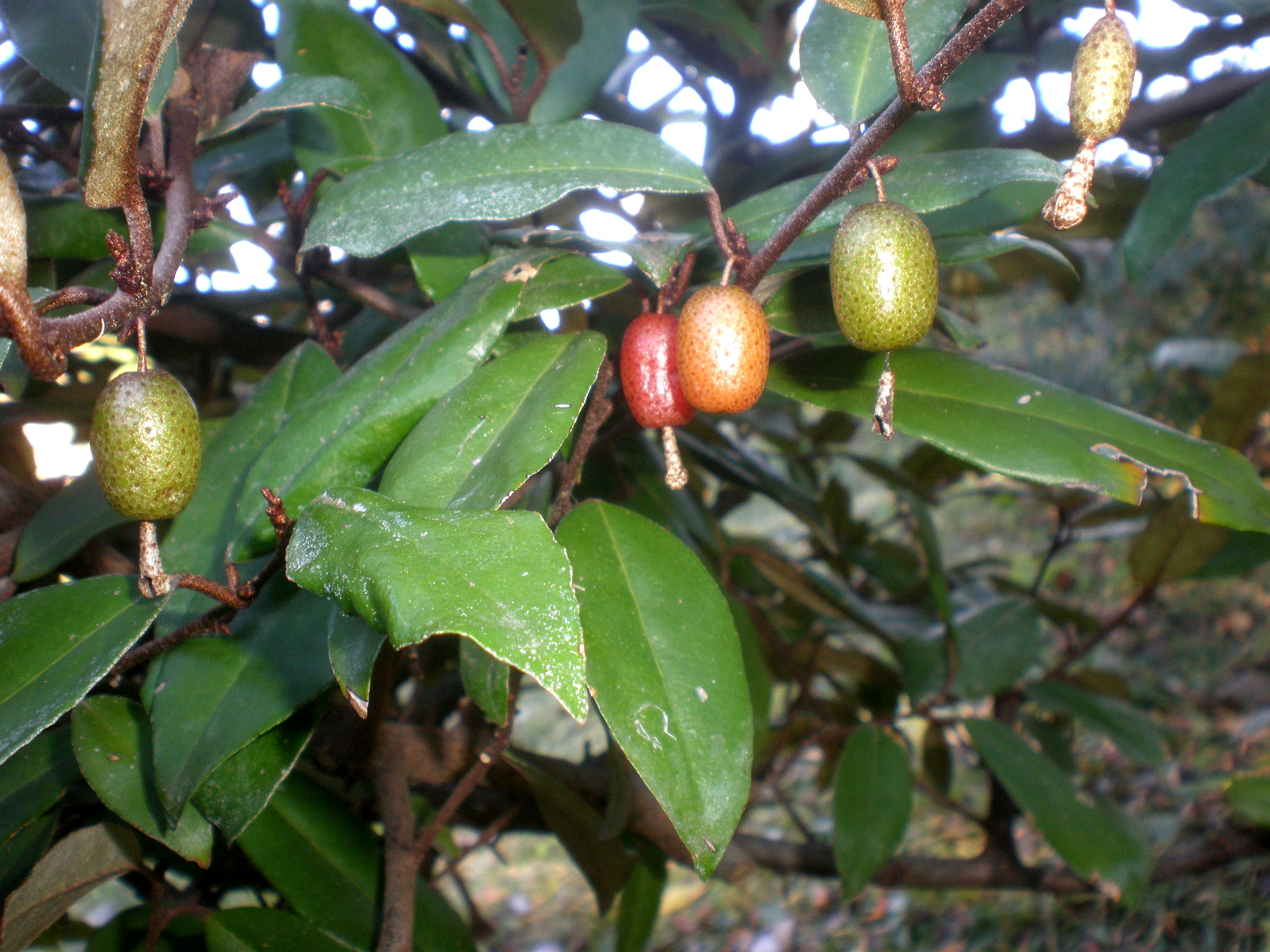 Jardín Botánico de Barcelona.